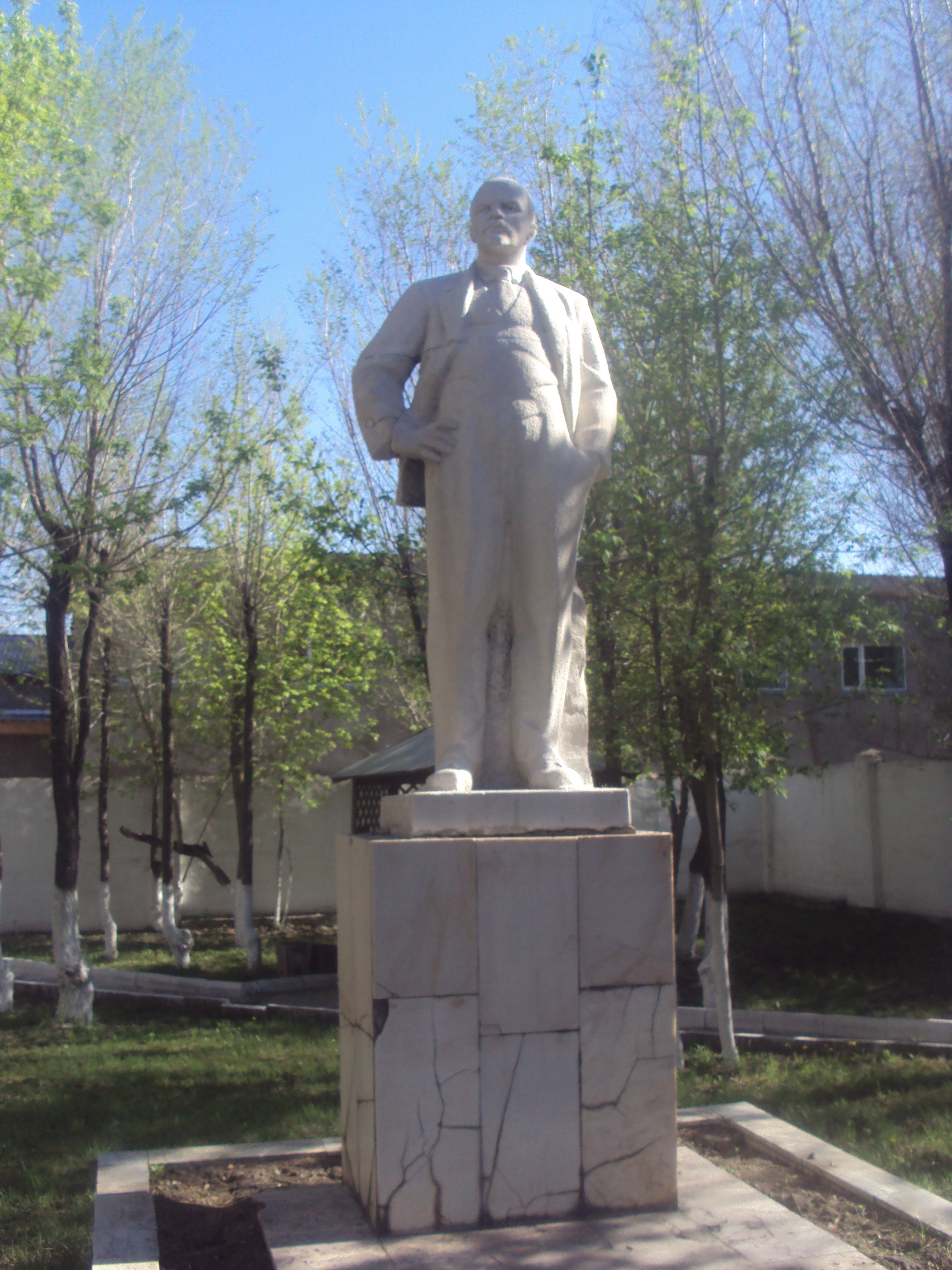 В. И. Ленин во внутреннем дворике офиса Рудоуправления «Казмарганец» - дочки «Казхрома»